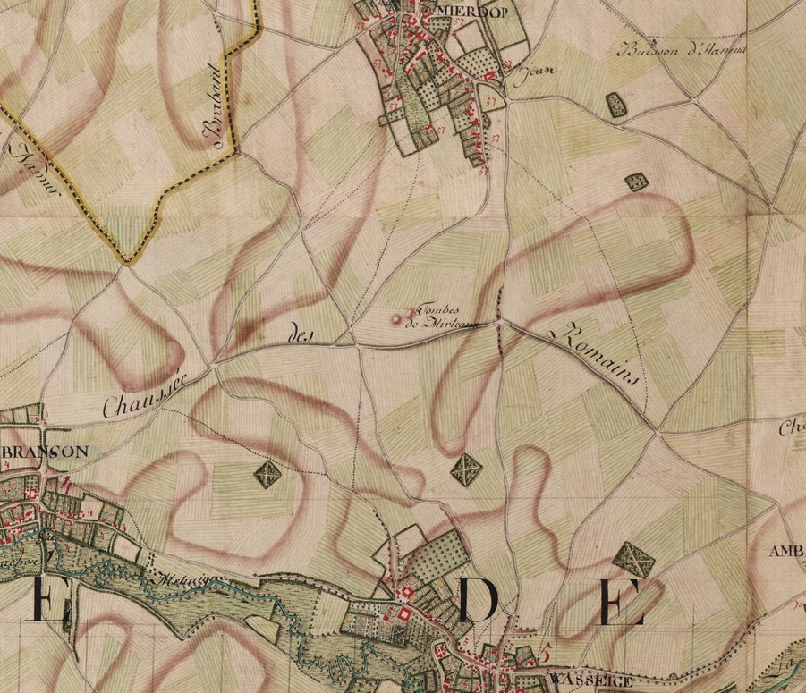 Extrait de la carte de Ferraris n° 134A